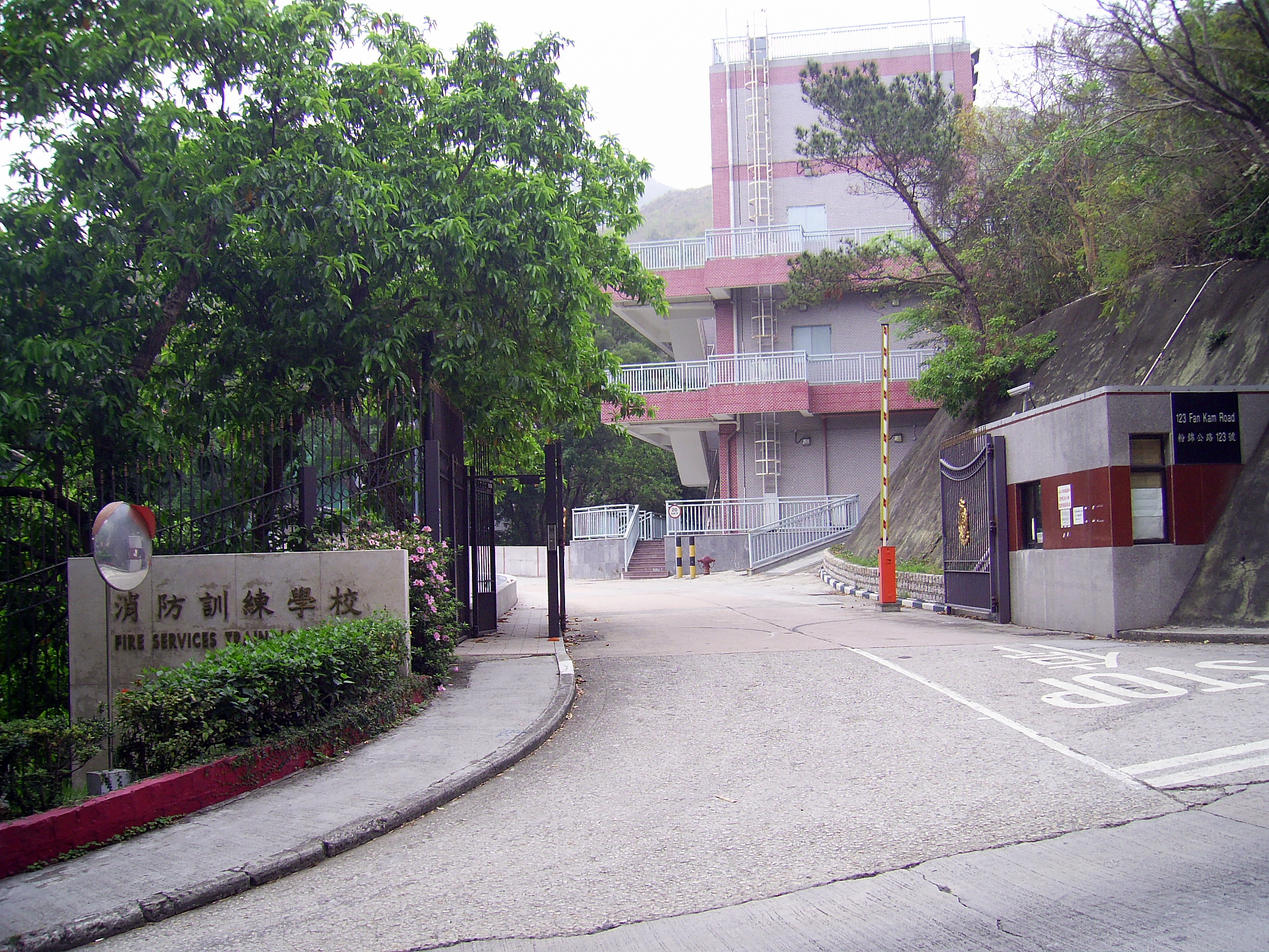 中文（香港）: 八鄉消防訓練學校